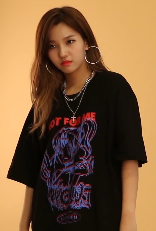 [TV10] 전소연 X 텐아시아 화보 촬영 메이킹 영상